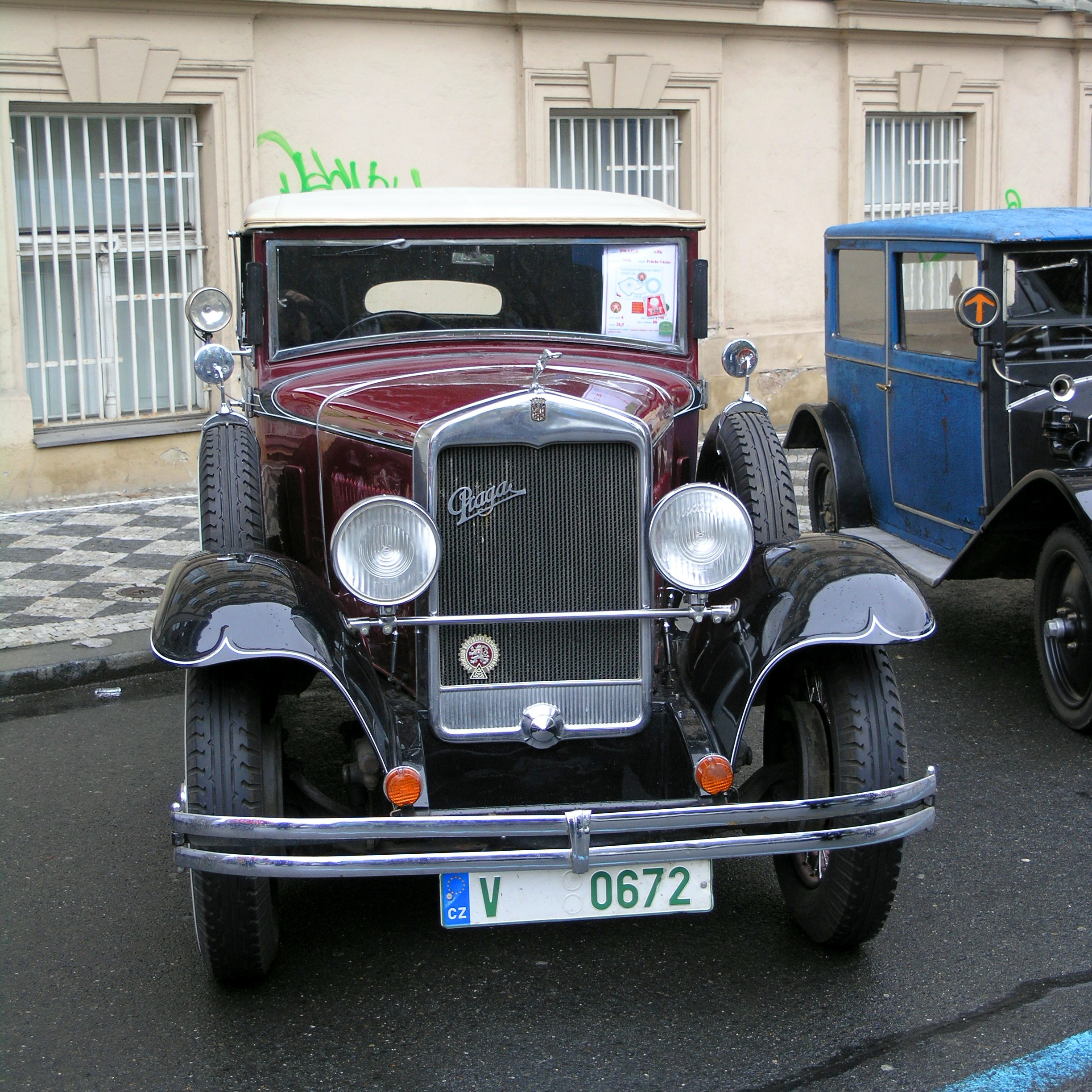 Vůz Praga Alfa (1931) účastnící se jízdy veteránů u příležitosti 90. výročí vzniku samostatného Československa, 28. října 2008